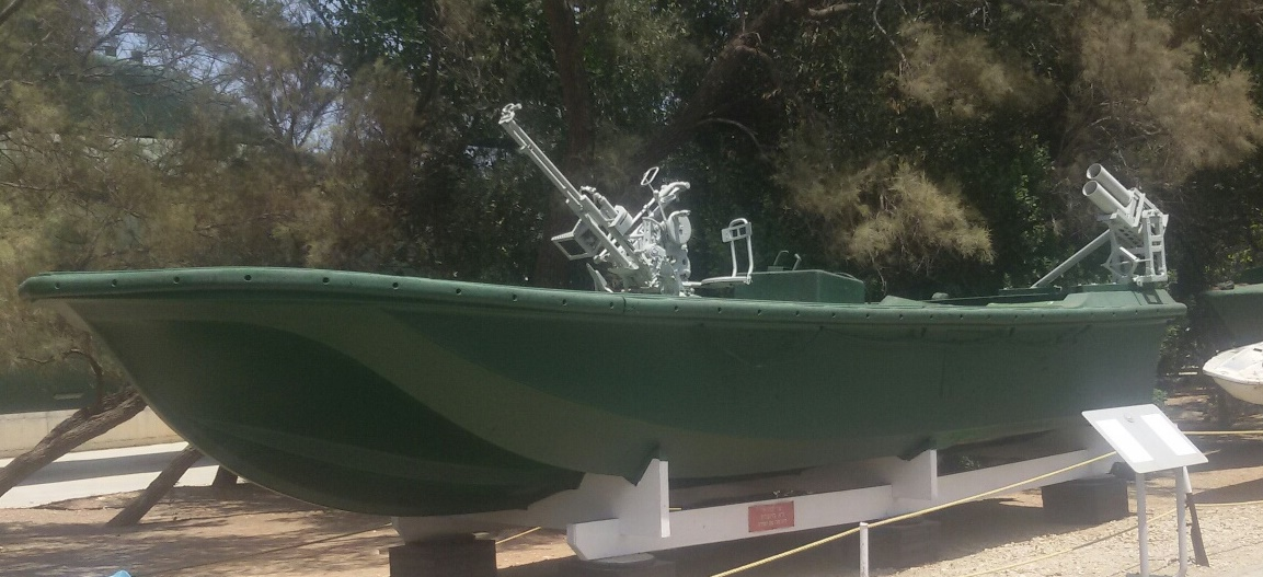 סירת המחבלים שברחה והחיפה בשטח אש מדרום לניצנים מוצבת במוזיאון ההעפלה וחיל הים בחיפה